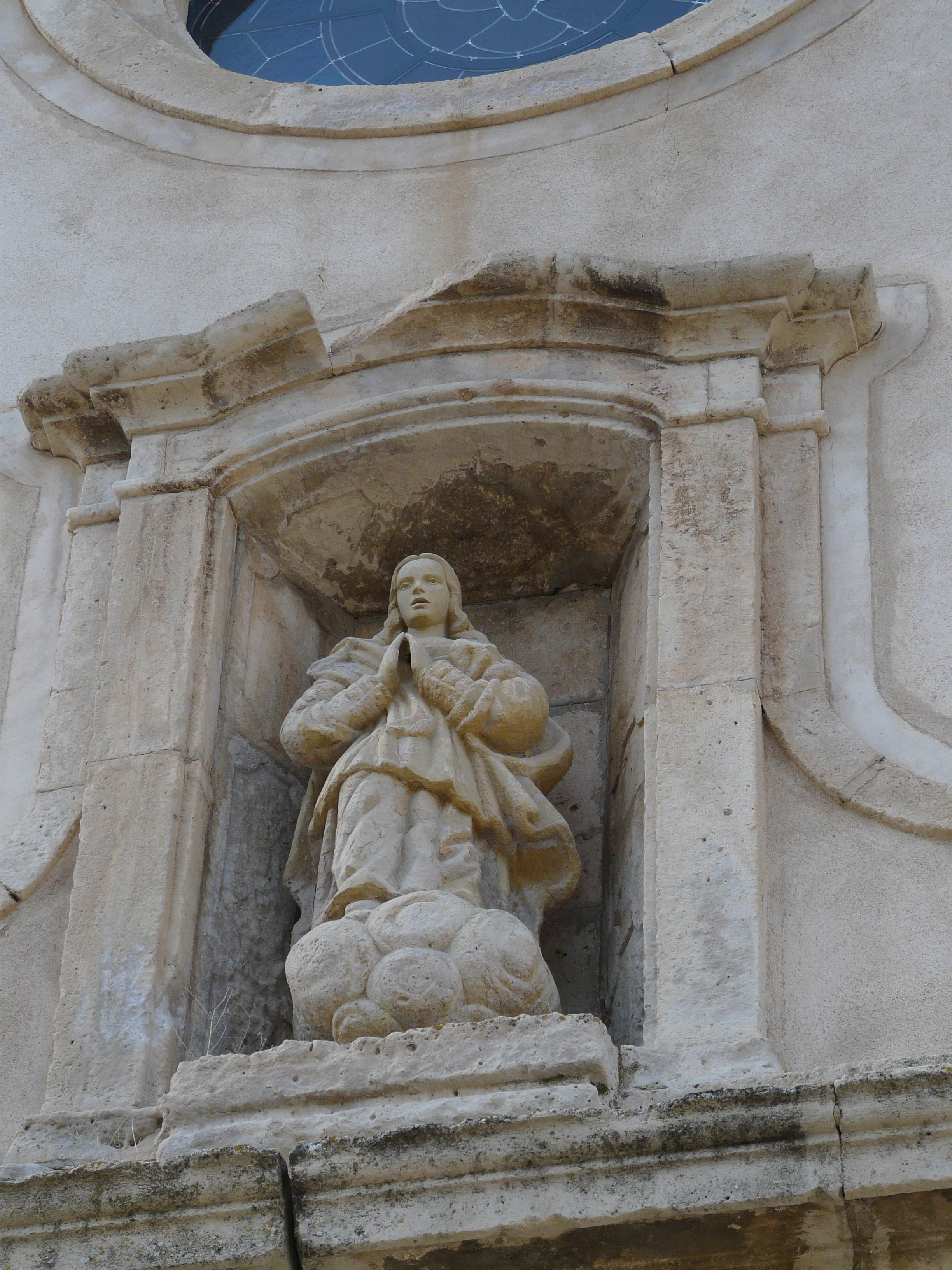 Església parroquial de Santa Maria (Capafonts) Object location41° 17′ 42.07″ N, 1° 01′ 38.94″ E